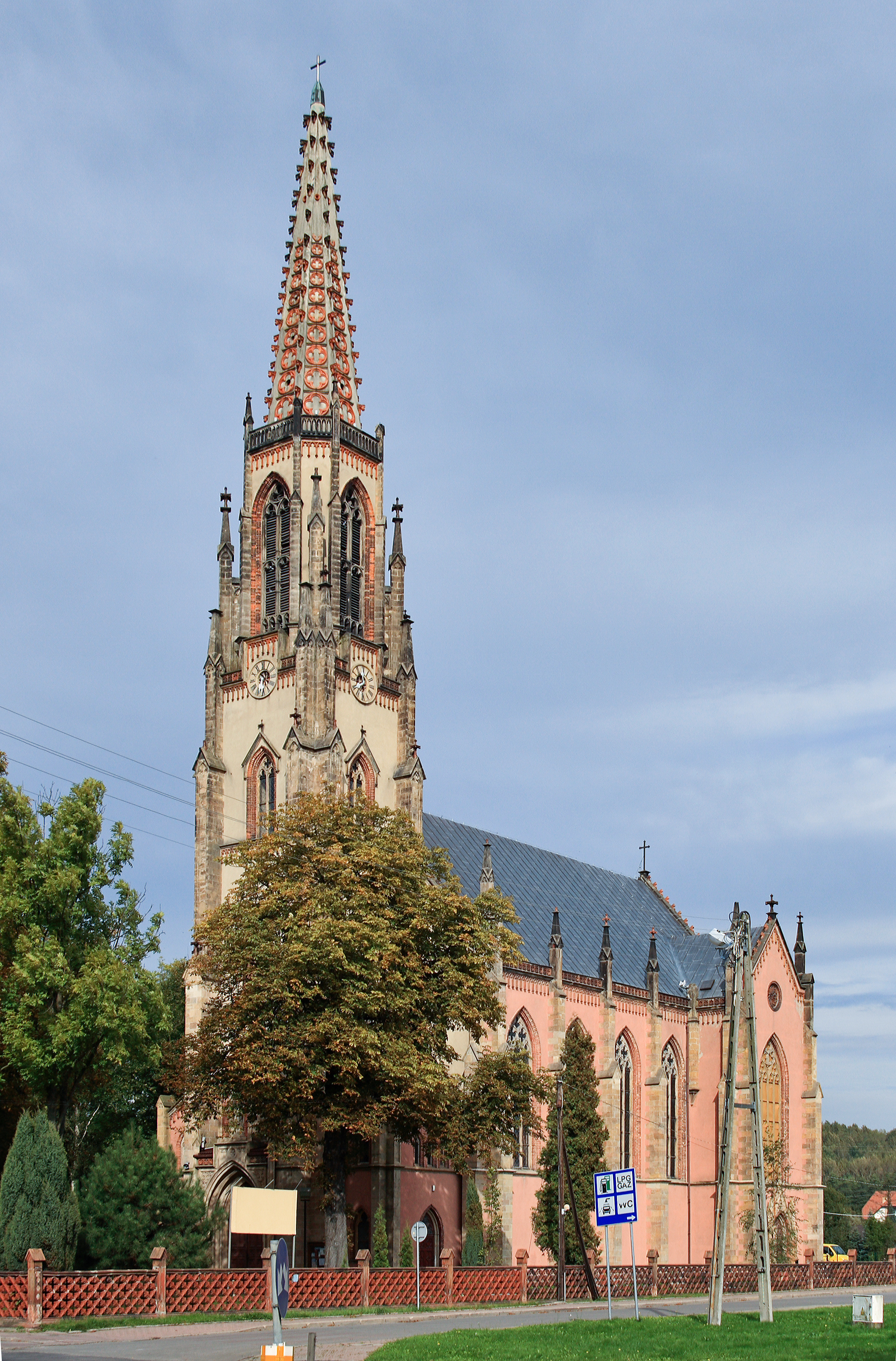 Bogatynia, ul. Kurzańska 3 - rzymskokatolicki kościół parafialny p.w. Niepokalanego Poczęcia NMP, 1863-1868